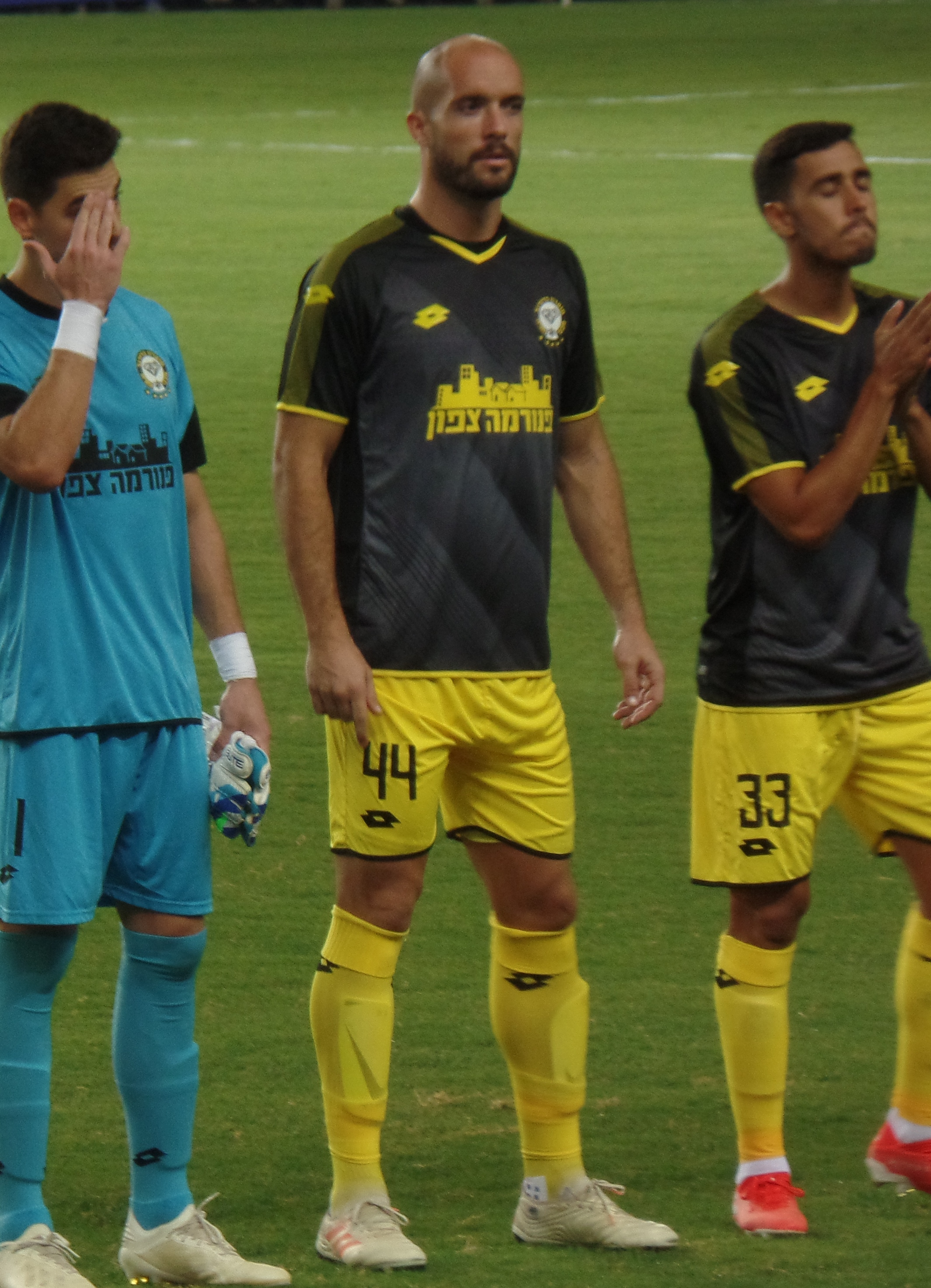 רומן גולובארט במדי מכבי נתניה